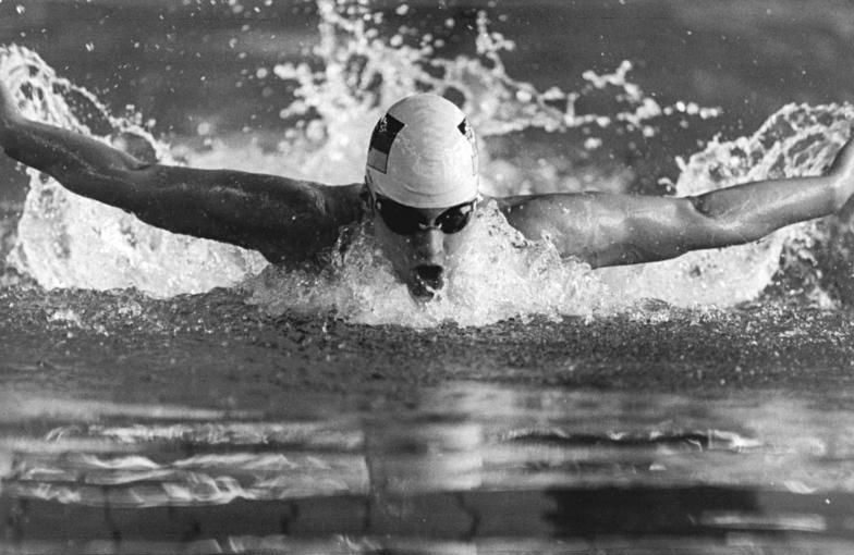 Birte Weigang ADN-ZB Settnik 22.7.88 Potsdam: 39. DDR-Meisterschaften im Schwimmen- Birte Weigang (SC Turbine Erfurt) verteidigte in 100-M-Schmetterling-Finale in ausgezeichneten 59,65 s ihren Titel und verfehlte den Europarekord nur um 0,24 s.